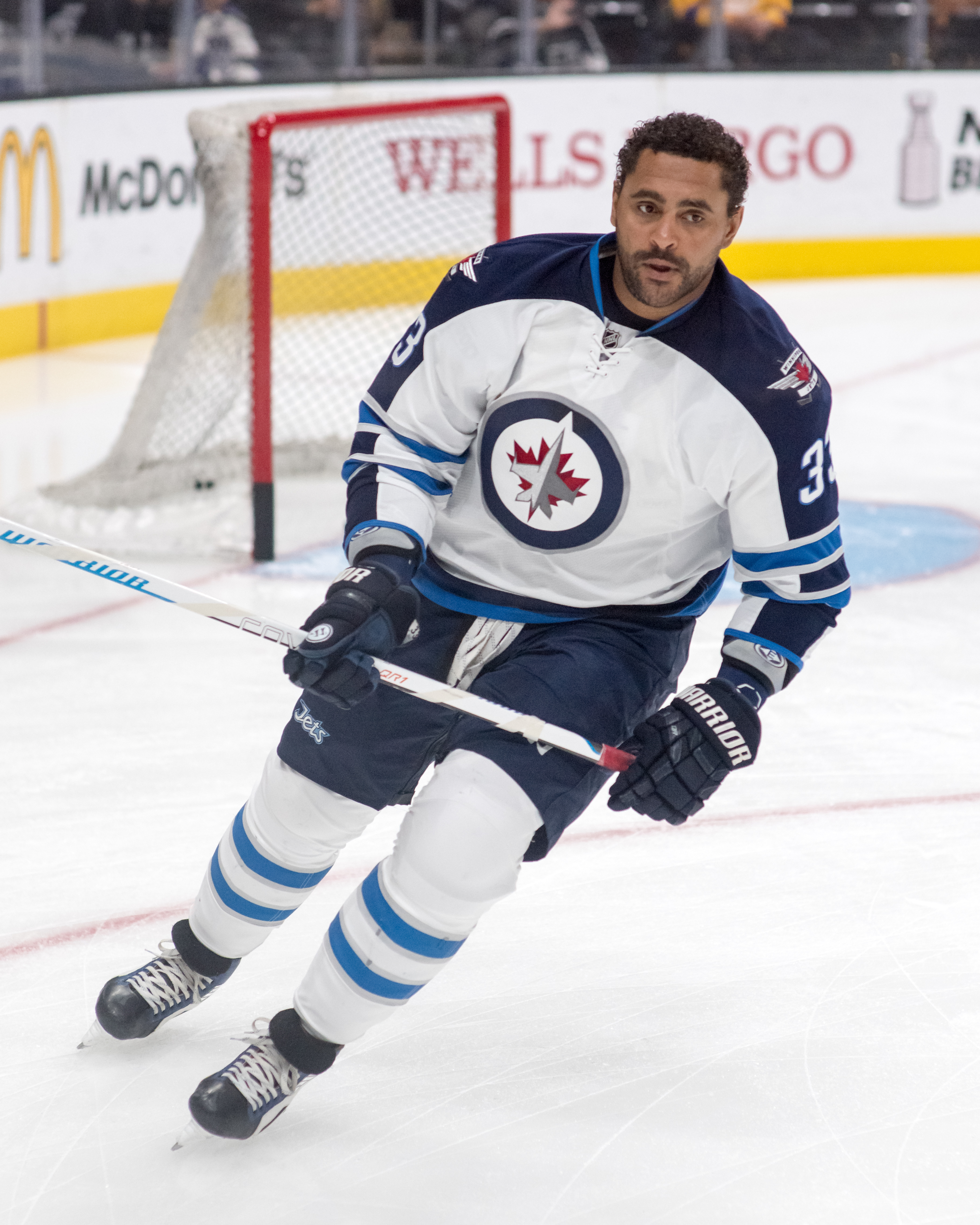 Dustin Byfuglien